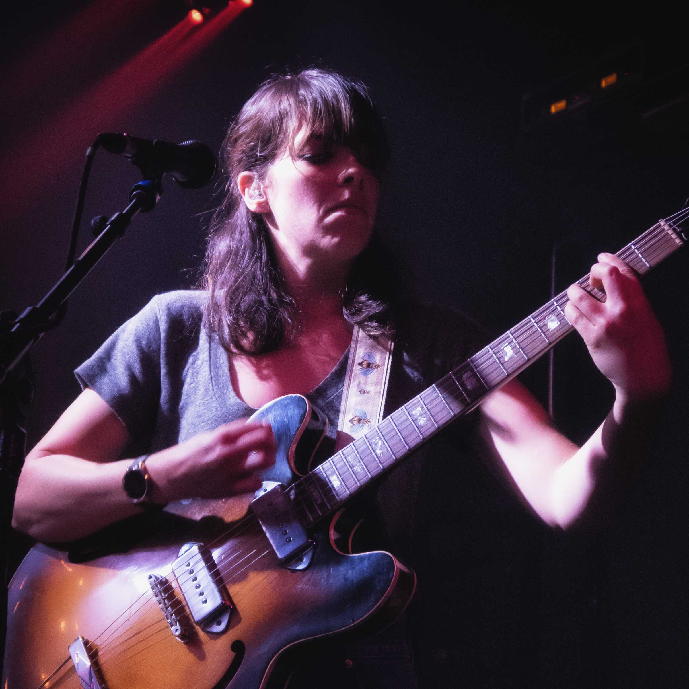 Hop Along